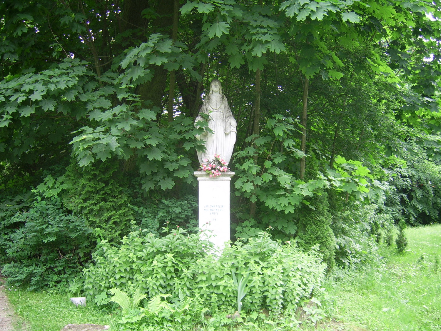 Małoszów (województwo świętokrzyskie) - figurka MB z 1918 roku, położona przy kościele.